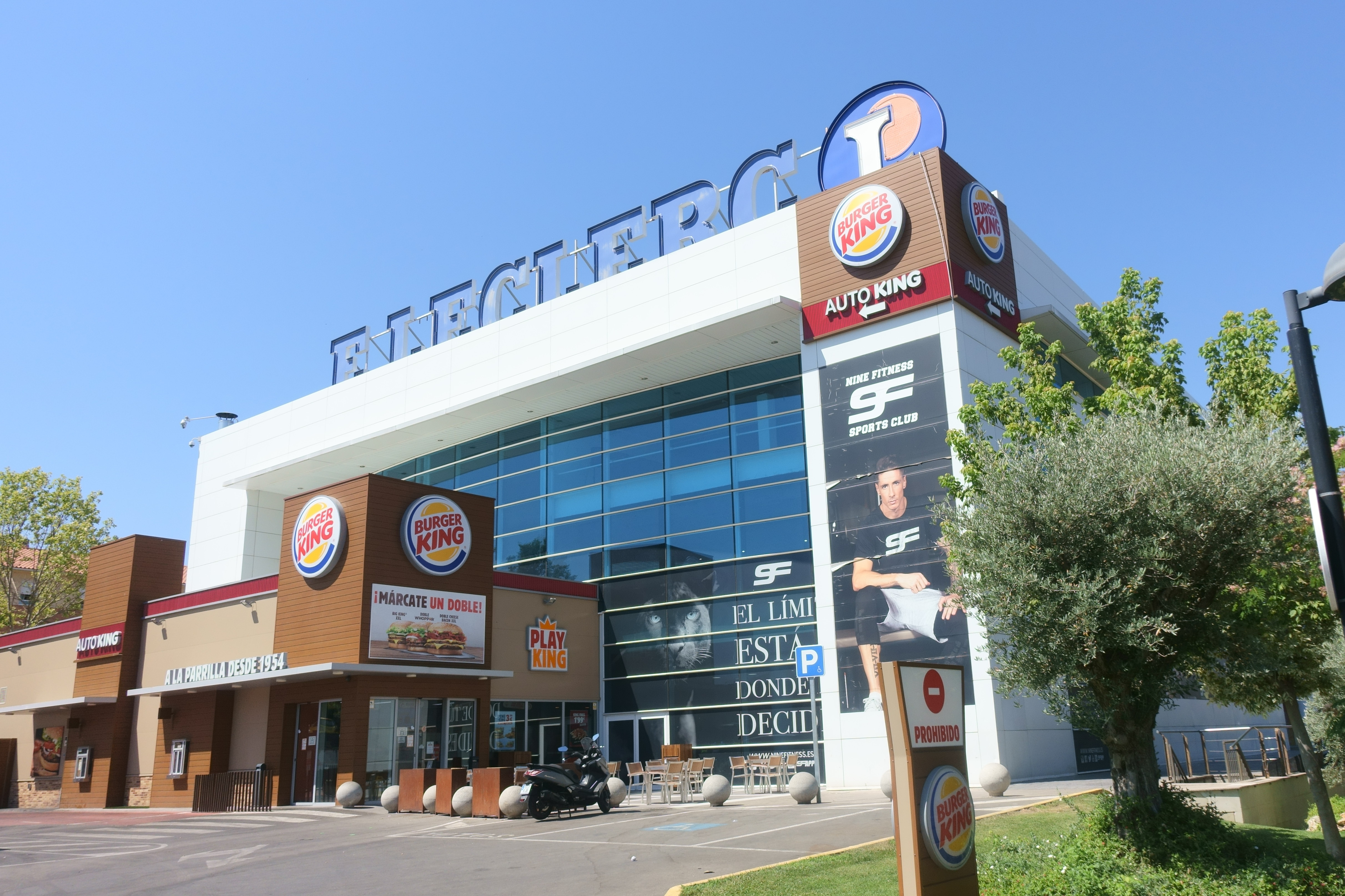 Centro Comercial El Deleite, en Aranjuez (Madrid, España).